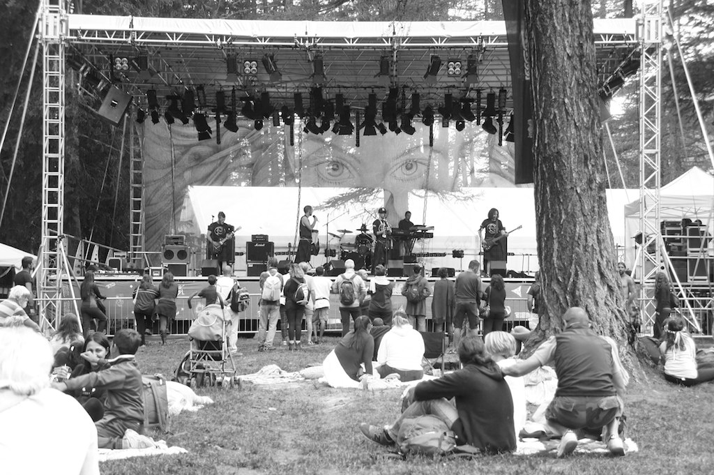 festival Celtica, XVII edizione, festa della musica arte e cultura celtica, 5-6-7luglio 2013 Bosco Peuterey, Courmayeur, Valle d'Aosta.